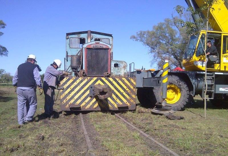 Locomotora Planet en Villa Ocampo, Santa Fe, Argentina.